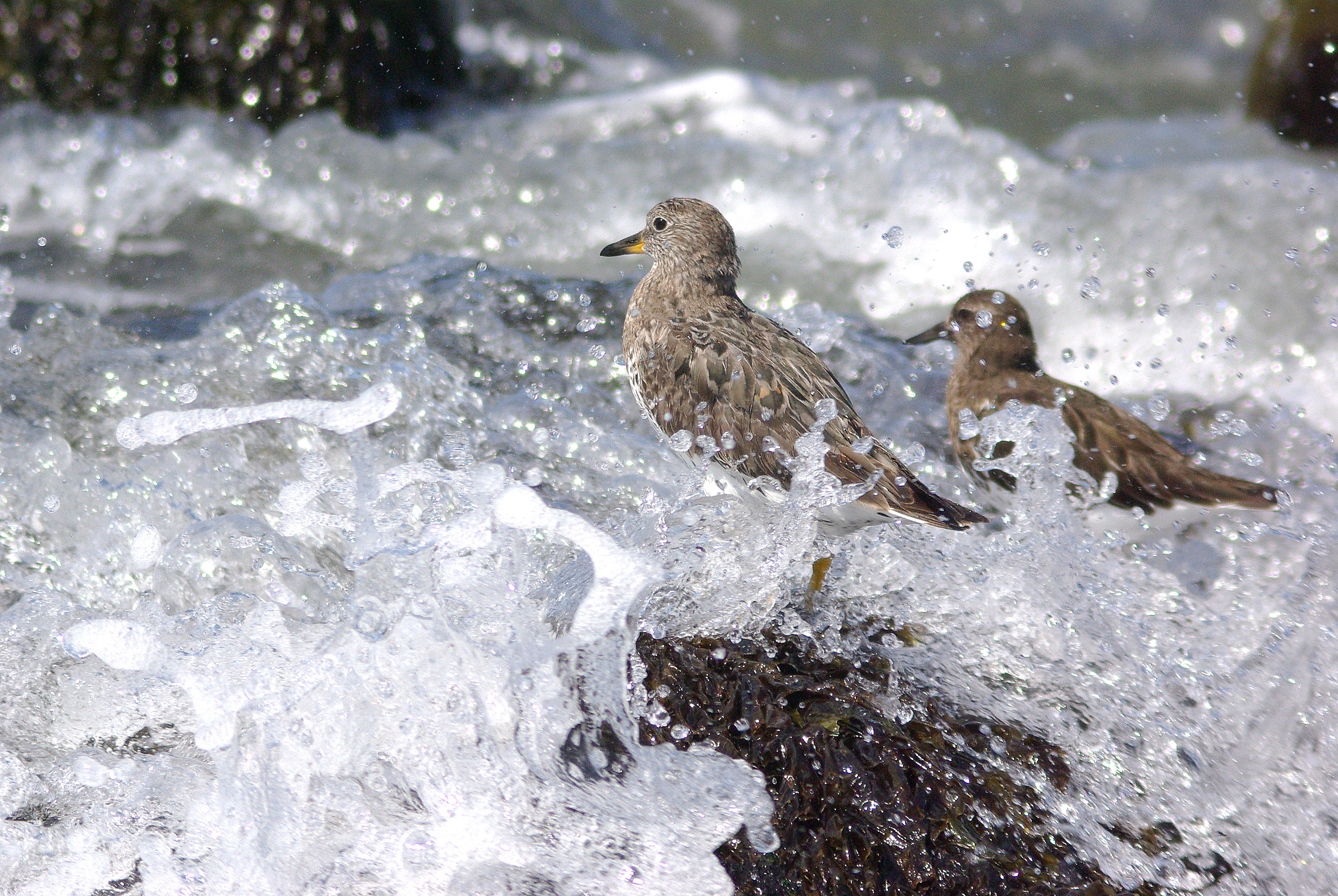 307 - SURFBIRD Calidris virgata (3-24-09) northpoint, slo co, ca (1)